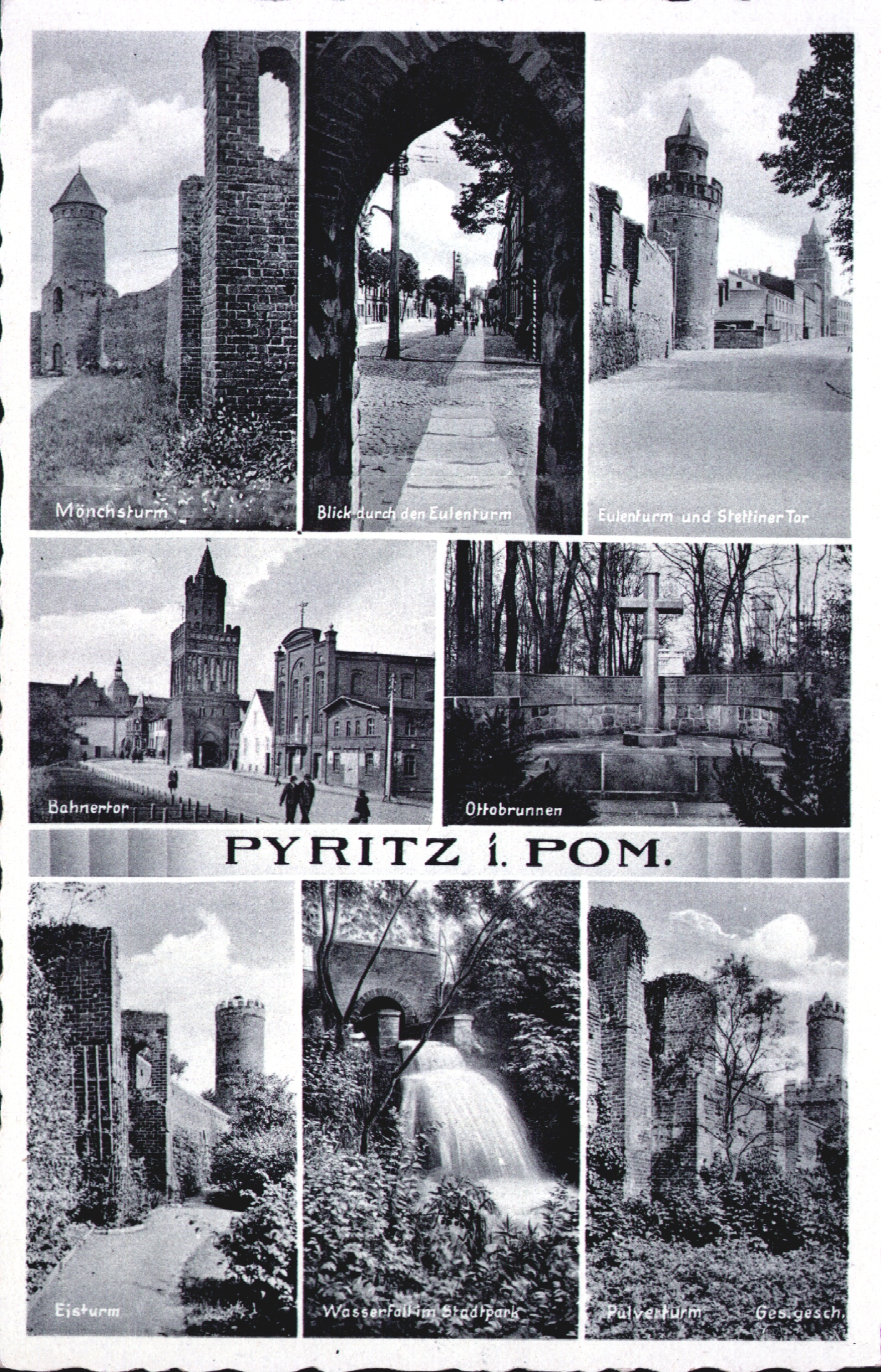 Pyrzyce na początku XX wieku.